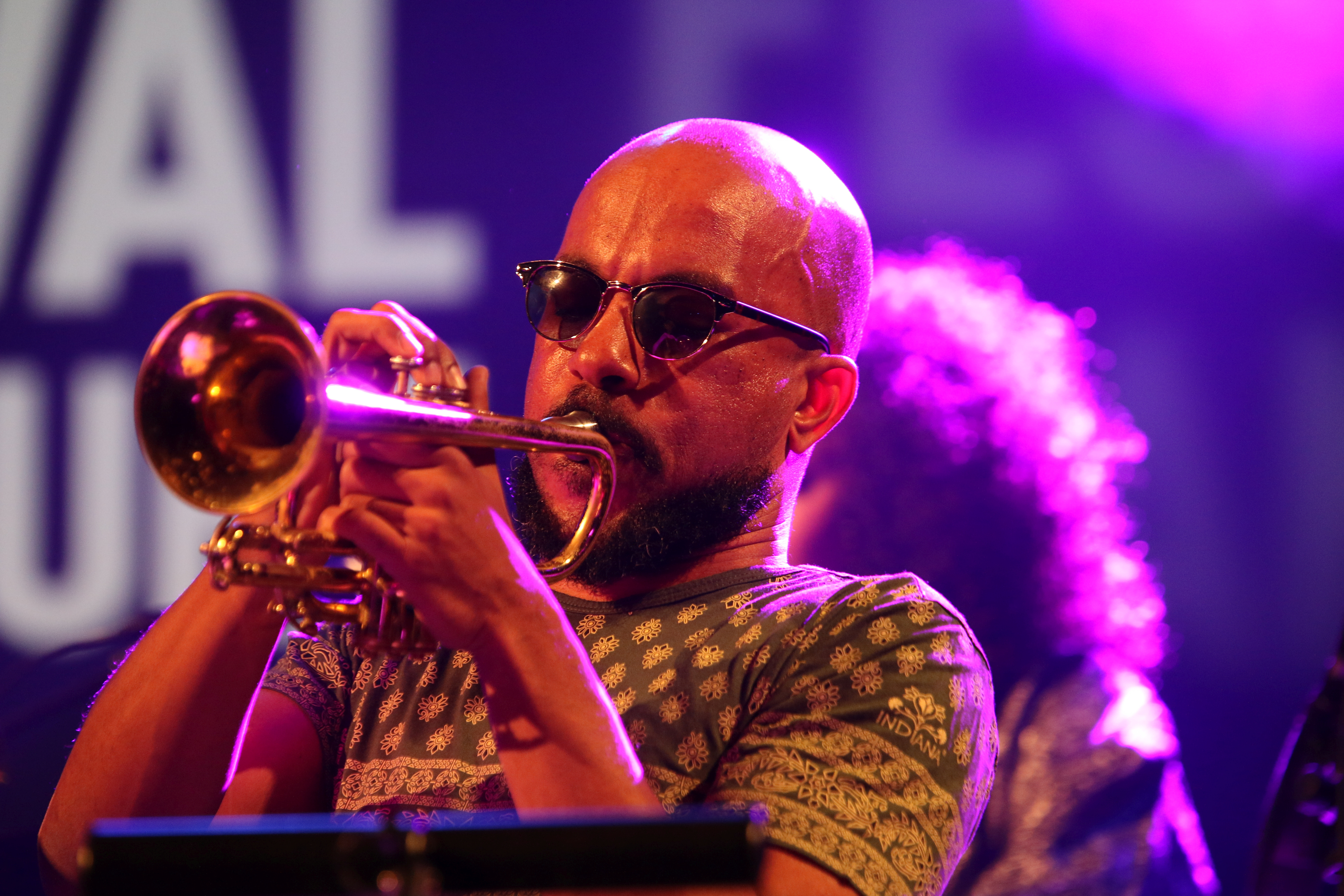 46. Deutsches Jazzfestival Frankfurt 2015: AACM Now Generation: Ben LaMar Gay